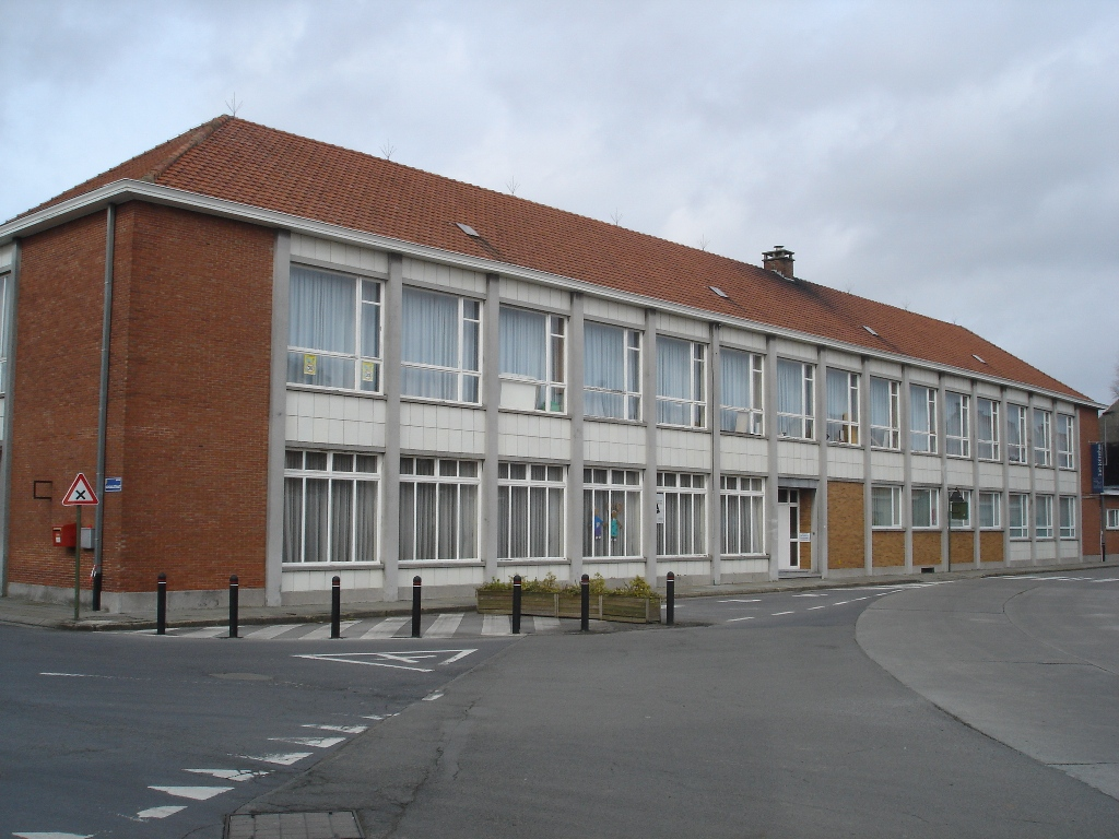 De voormalige meisjesschool, uitgebaat door de kloostergemeenschap O.L.V.-ten-bunderen. Nu zitten hier de eerste jaren van de lager school 'De Graankorrel' gevestigd.